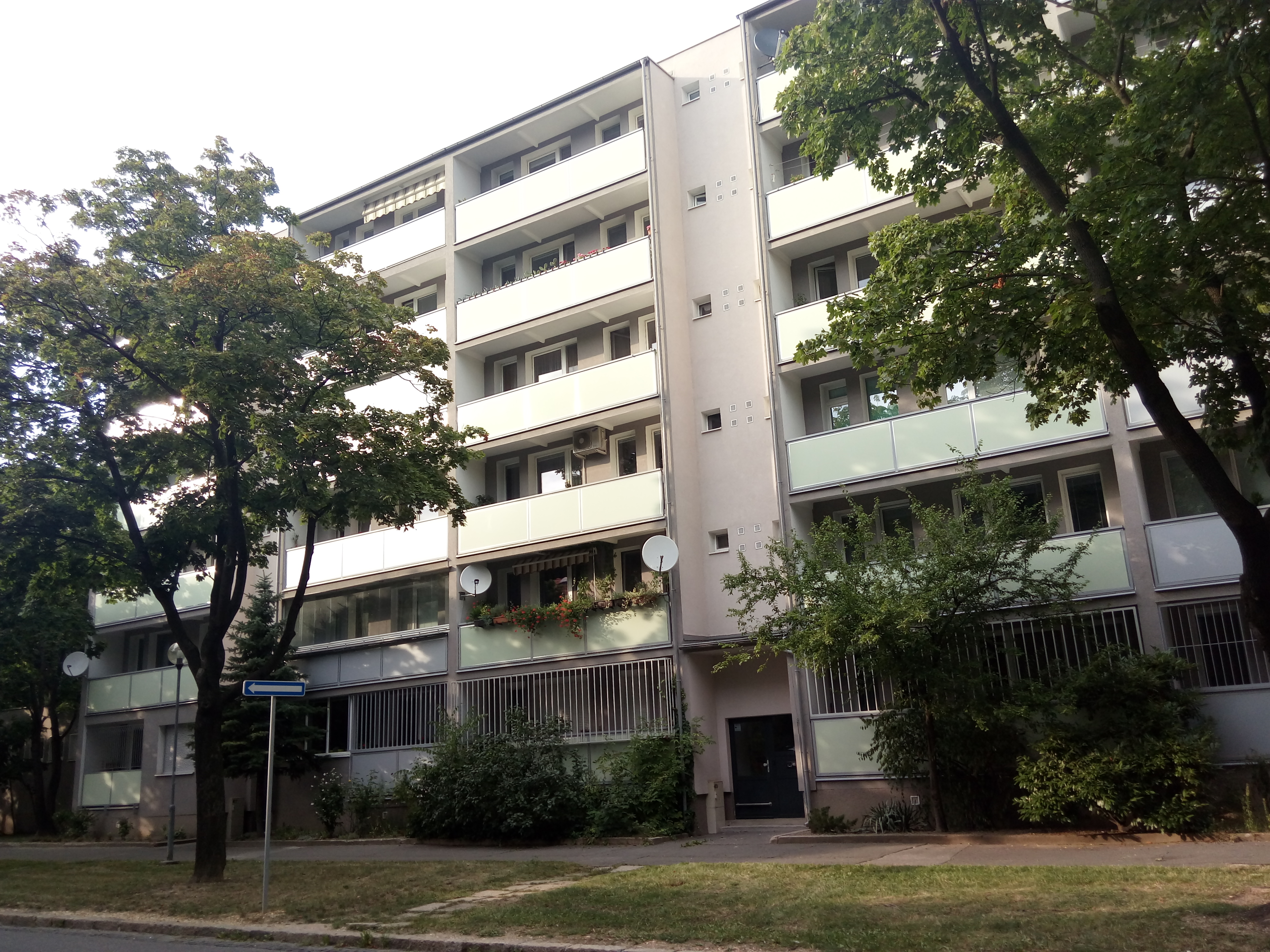 Kutuzovova 4, Nové Mesto, Bratislava